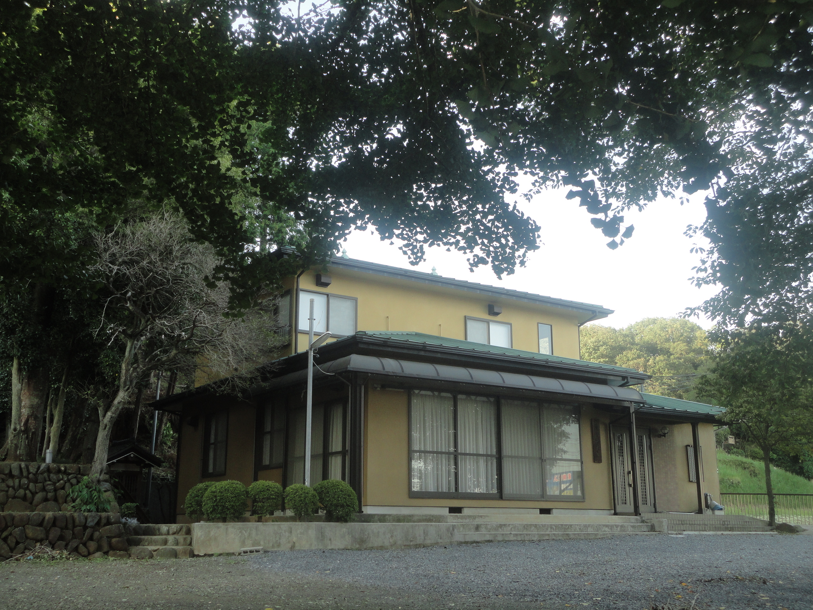 東中野会館